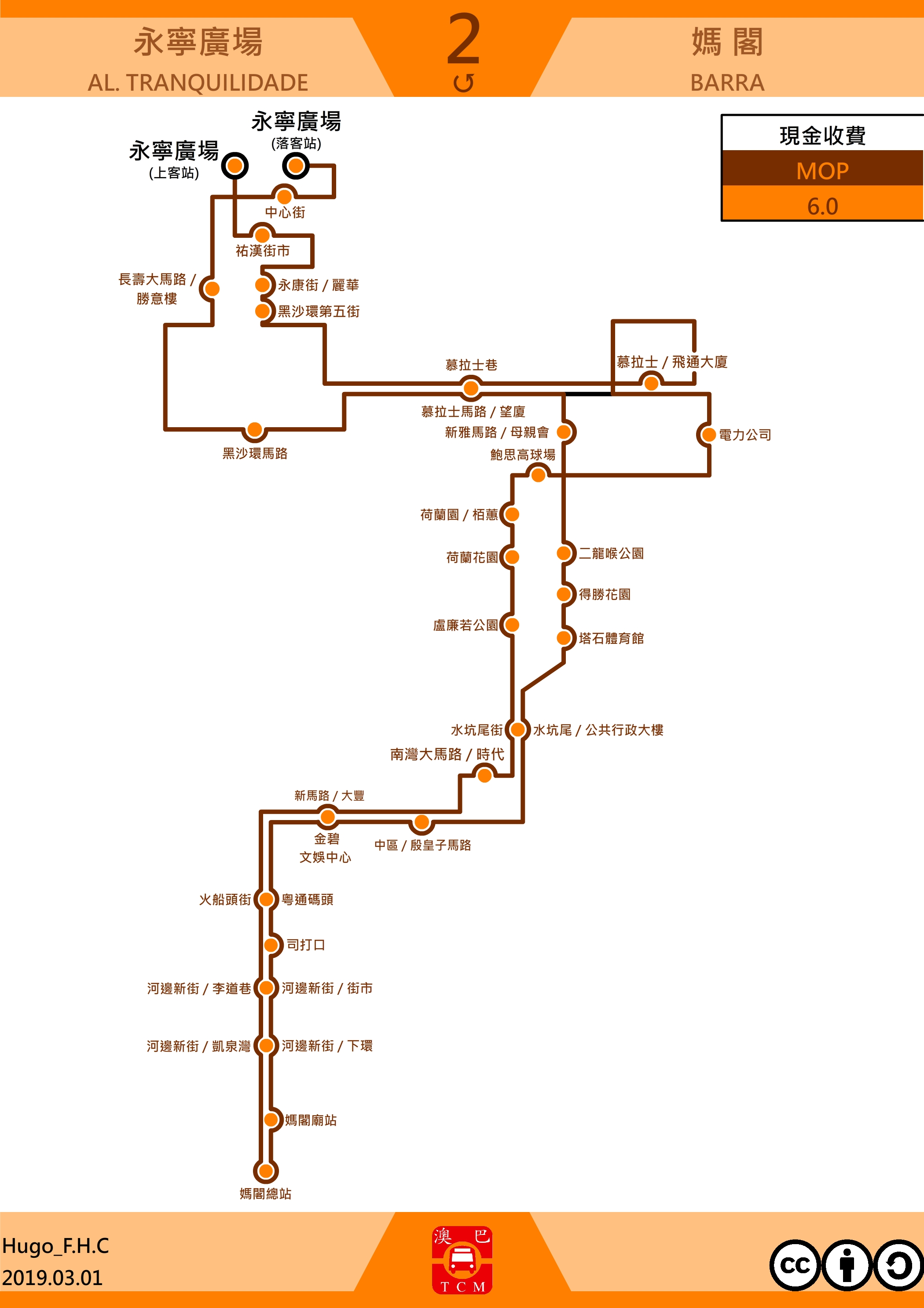 澳門巴士2走線圖